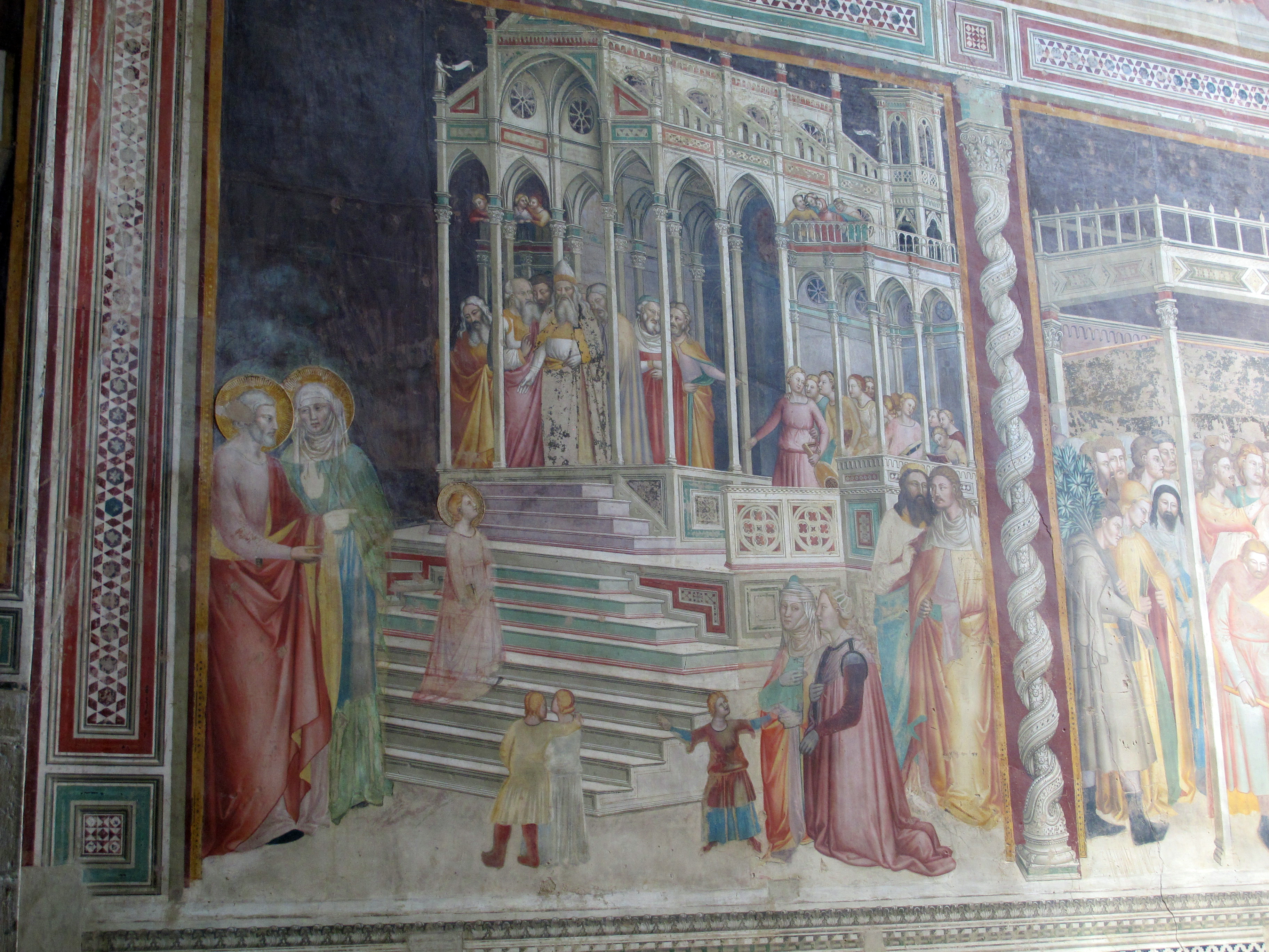 Cappella rinuccini, storie della vergine